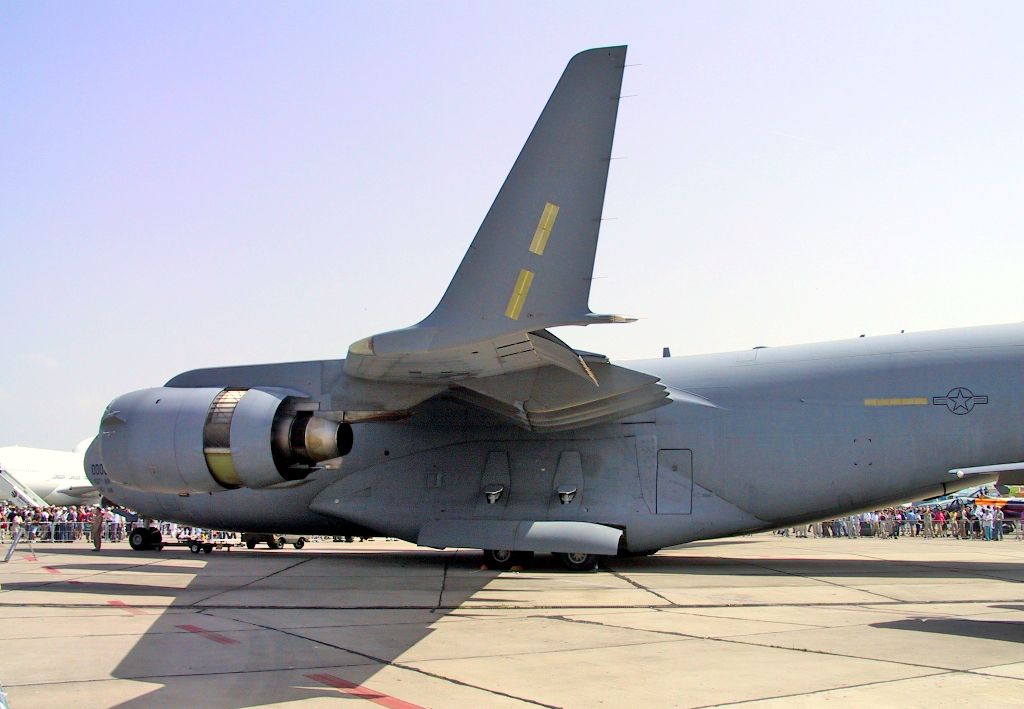 Eine C-17 Globemaster III der United States Air Force auf der ILA 2002.